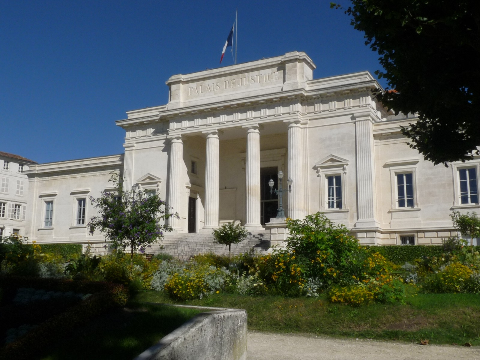 Palais de justice, Saintes, Charente-Maritime, France